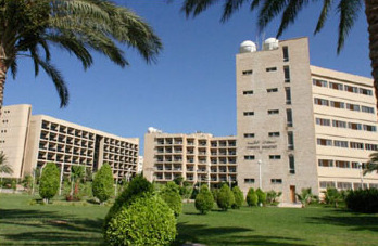 إسكان الطلبة